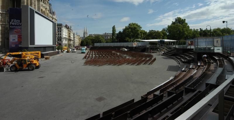 "Zuschauerraum" des Filmfestivals auf dem Wiener Rathausplatz 2007